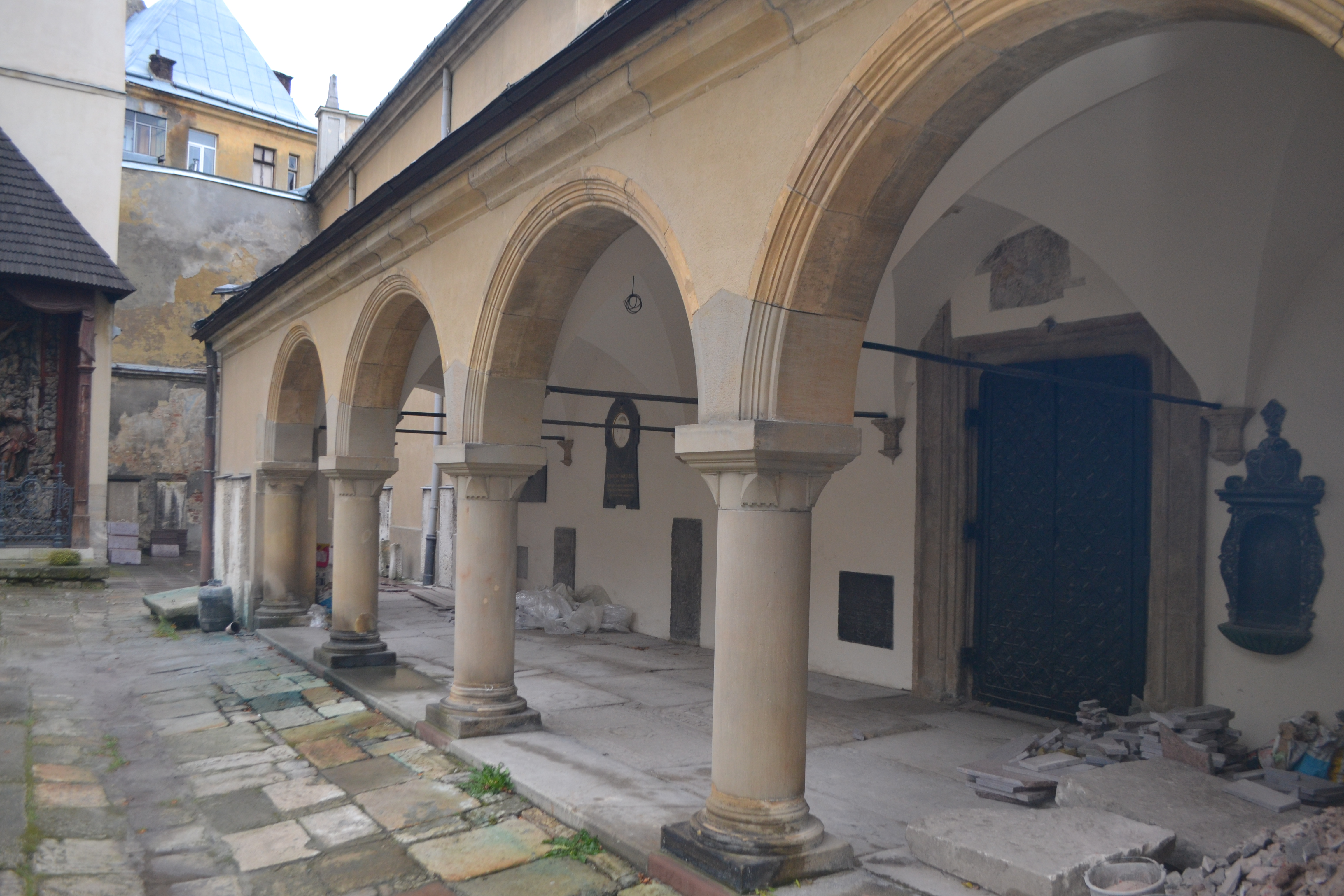 Вірменський собор св. Трійці, Львів, Вірменська вул., 7